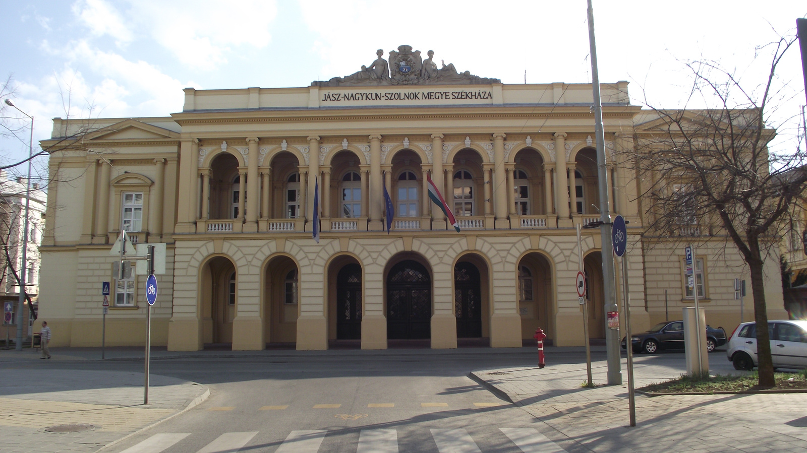 Megyeháza (Szolnok, Kossuth u. 2 .) This is a photo of a monument in Hungary, Identifier: 6046